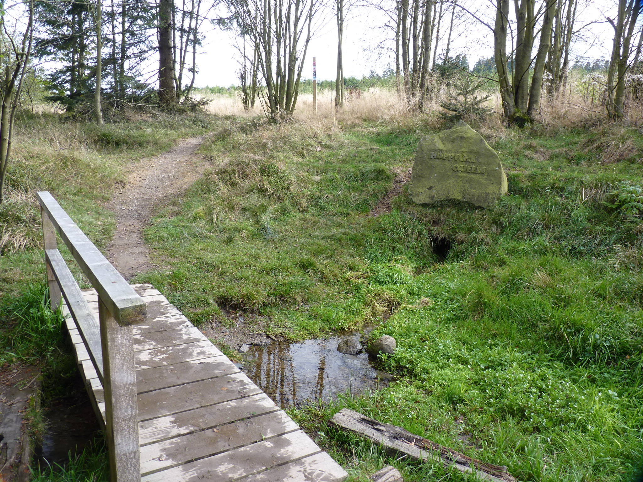 Die Hoppeckequelle in der Niedersfelder Hochheide im September 2014